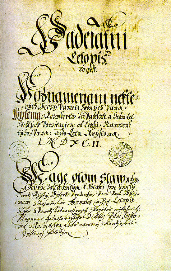 Václav Březan, titulní list Životopisu Viléma z Rožmberka, 16. století